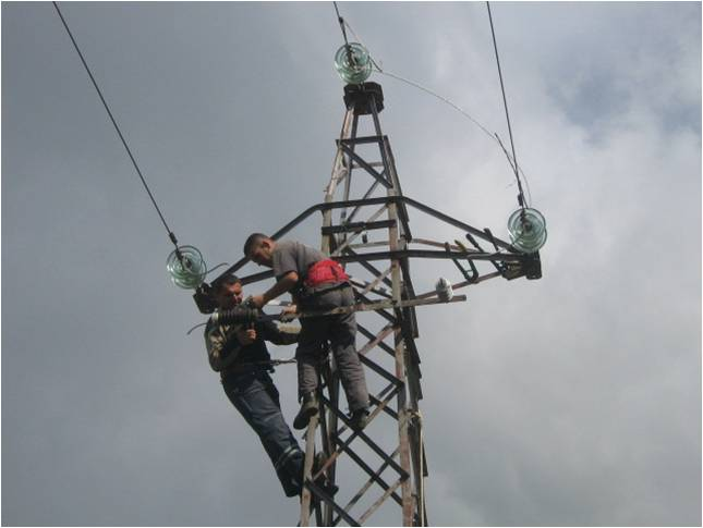 Sherbimet e Montingut